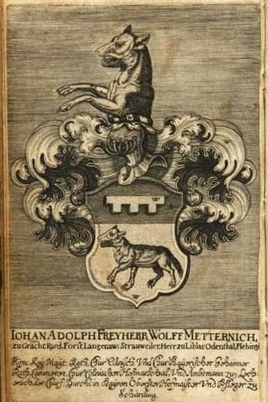 Exlibris mit Wappen des Johann Adolph Freiherr Wolff Metternich, zu Gracht, Raed, Forst, Langenau, Strauweiler, Herr zu Liblar, Odenthal, Flehingen (1592–1669). Römischer Kaiserlicher Majestät Rat, Kurkölnischer und Kurbayerischer Geheimer Rat, Kämmerer, Kurkölnischer Hofmarschall, und Amtmann zu Lechenich, der Kurfürstlichen Durchlaucht in Bayern Oberster Hofmeister und Pfleger zu Schärding.